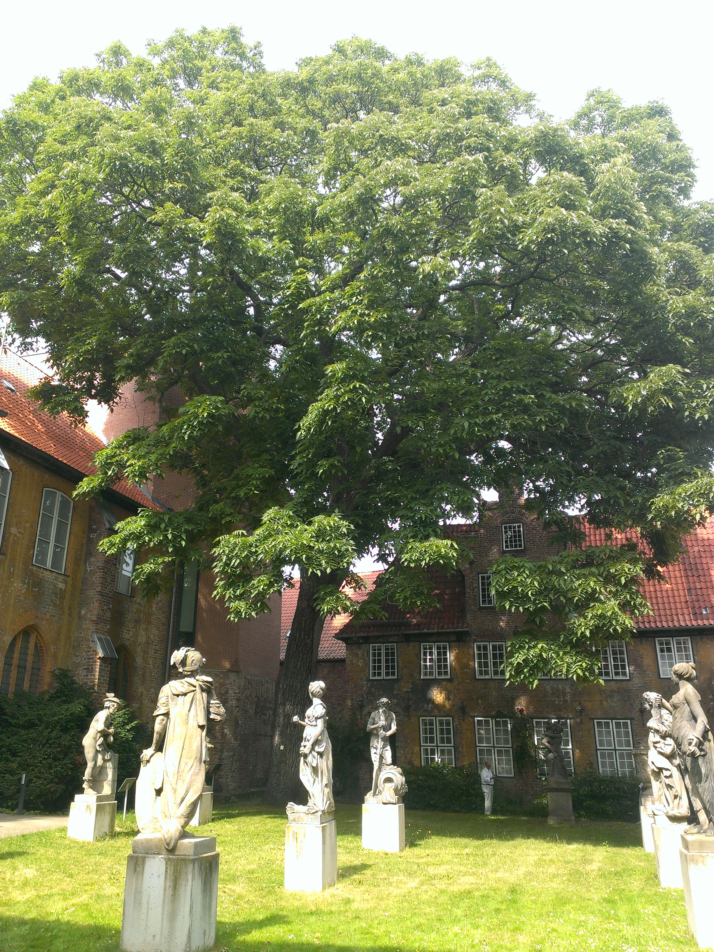 Schwarznuss als Naturdenkmal im Innenhof des St. Annen-Museums. Pflanzung um 1840.